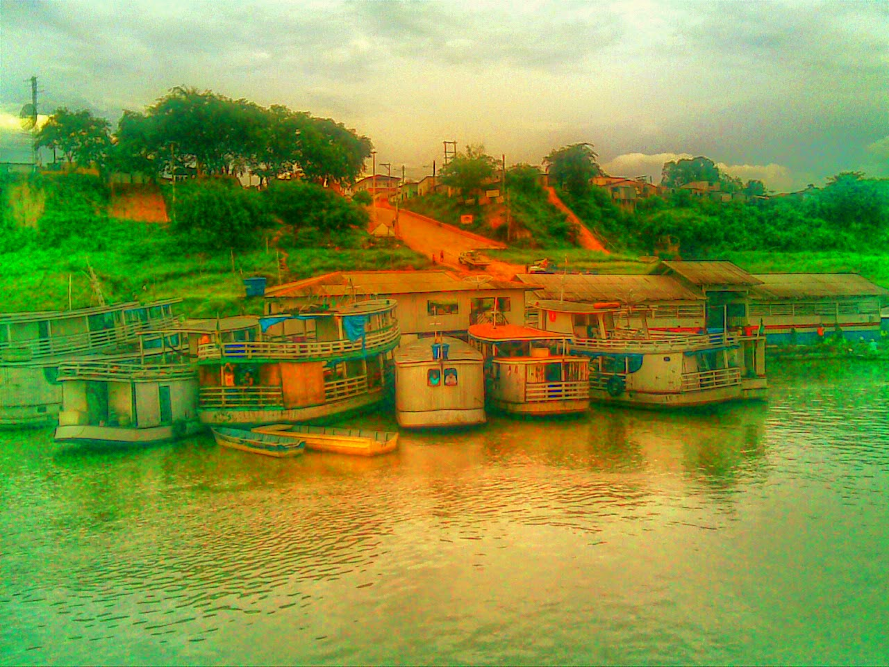 Humaitá-Amazonas